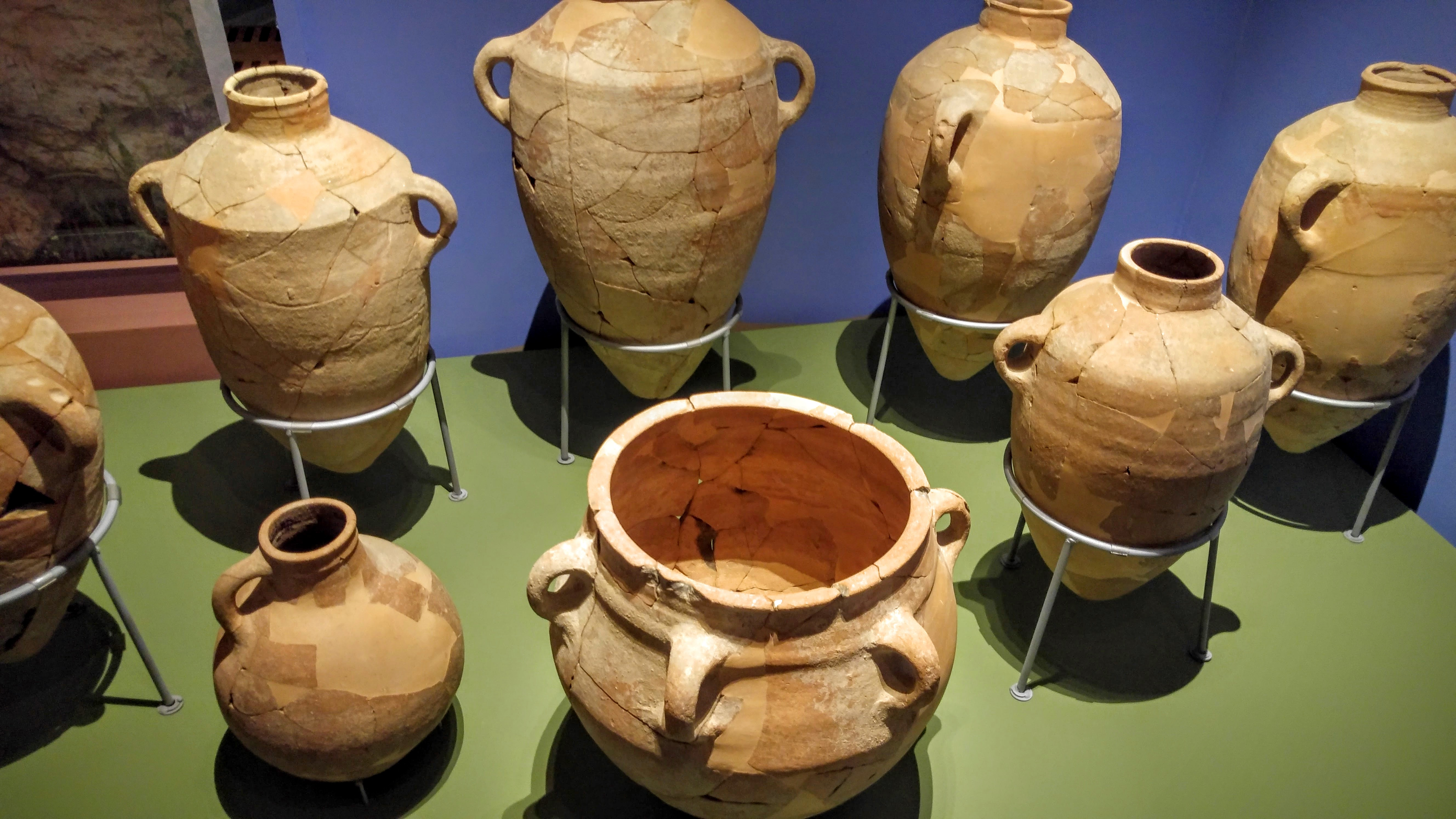 כדים שנמצאו בחורבת קייאפה מוצגים בתערוכה במוזיאון ארצות המקרא